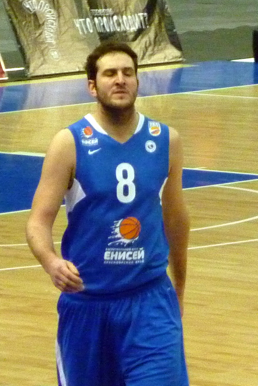 Форвард БК «Енисей» Драган Лабович в матче против БК «Нижний Новгород» 18 декабря 2010 года